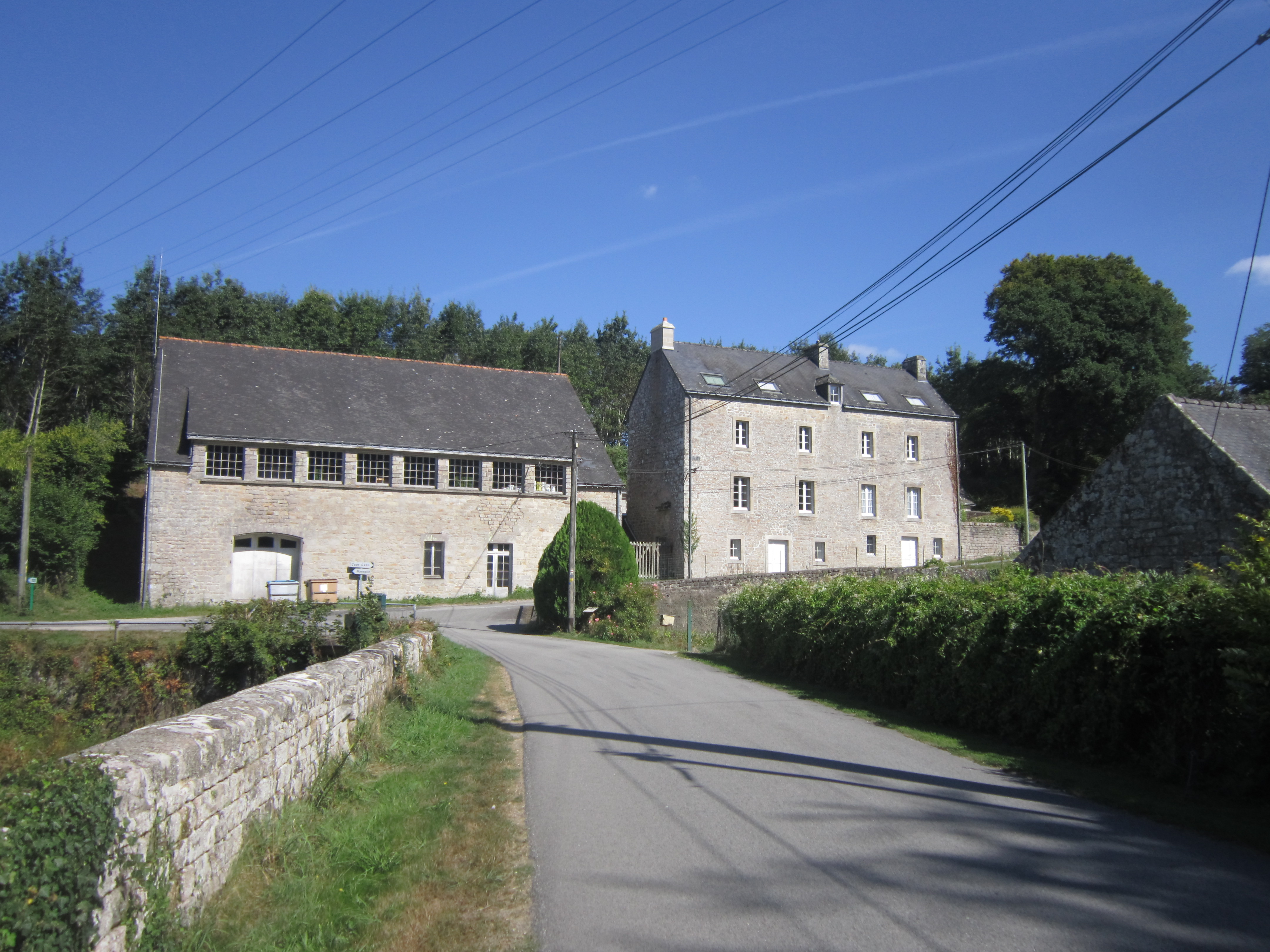 La digue de l'ancien étang et le hameau de Pontcallec, avec notamment les anciennes forges.